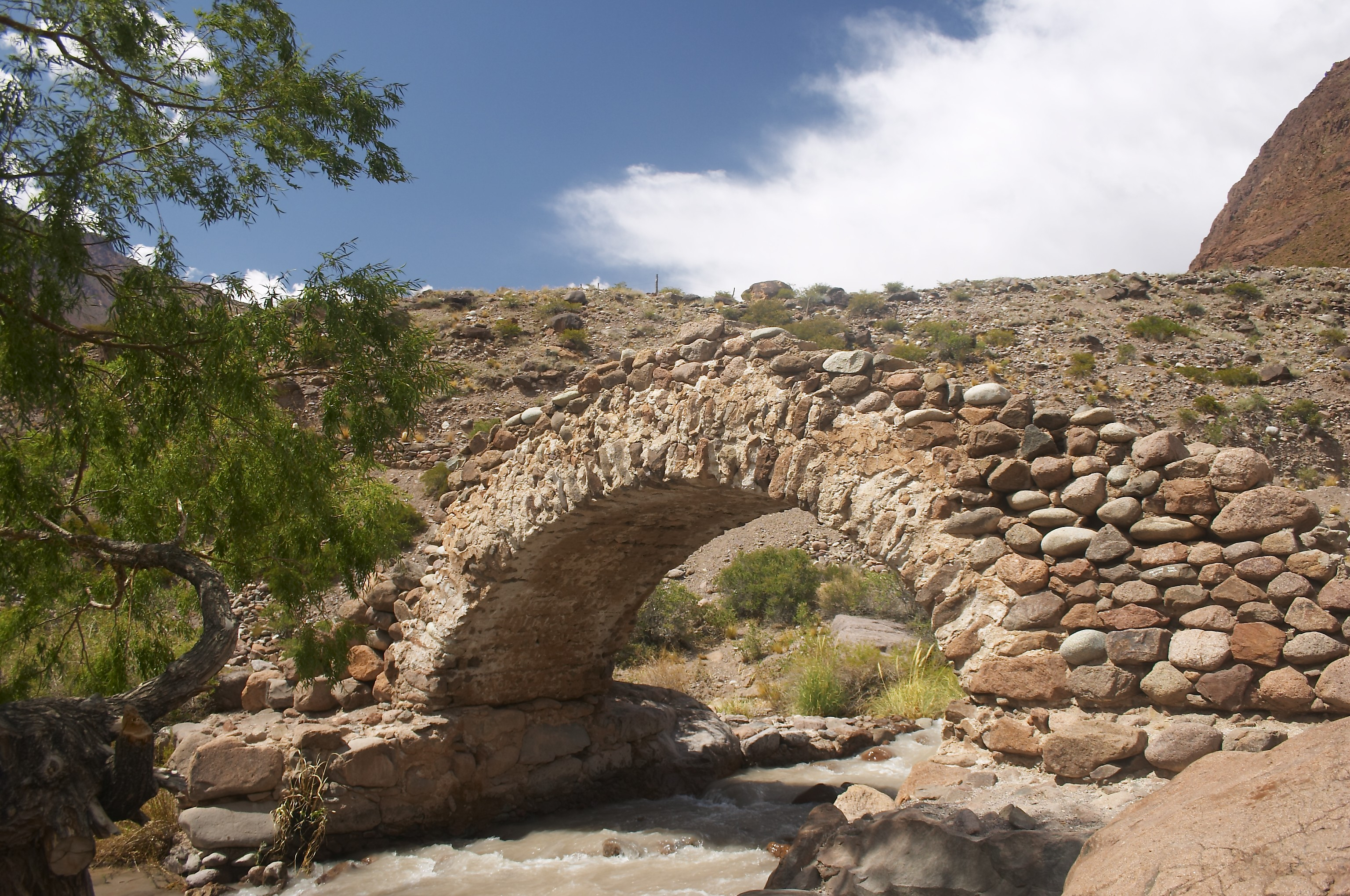 Puente sobre el Río Picheuta, Provincia de Mendoza, Argentina. Monumento histórico nacional.